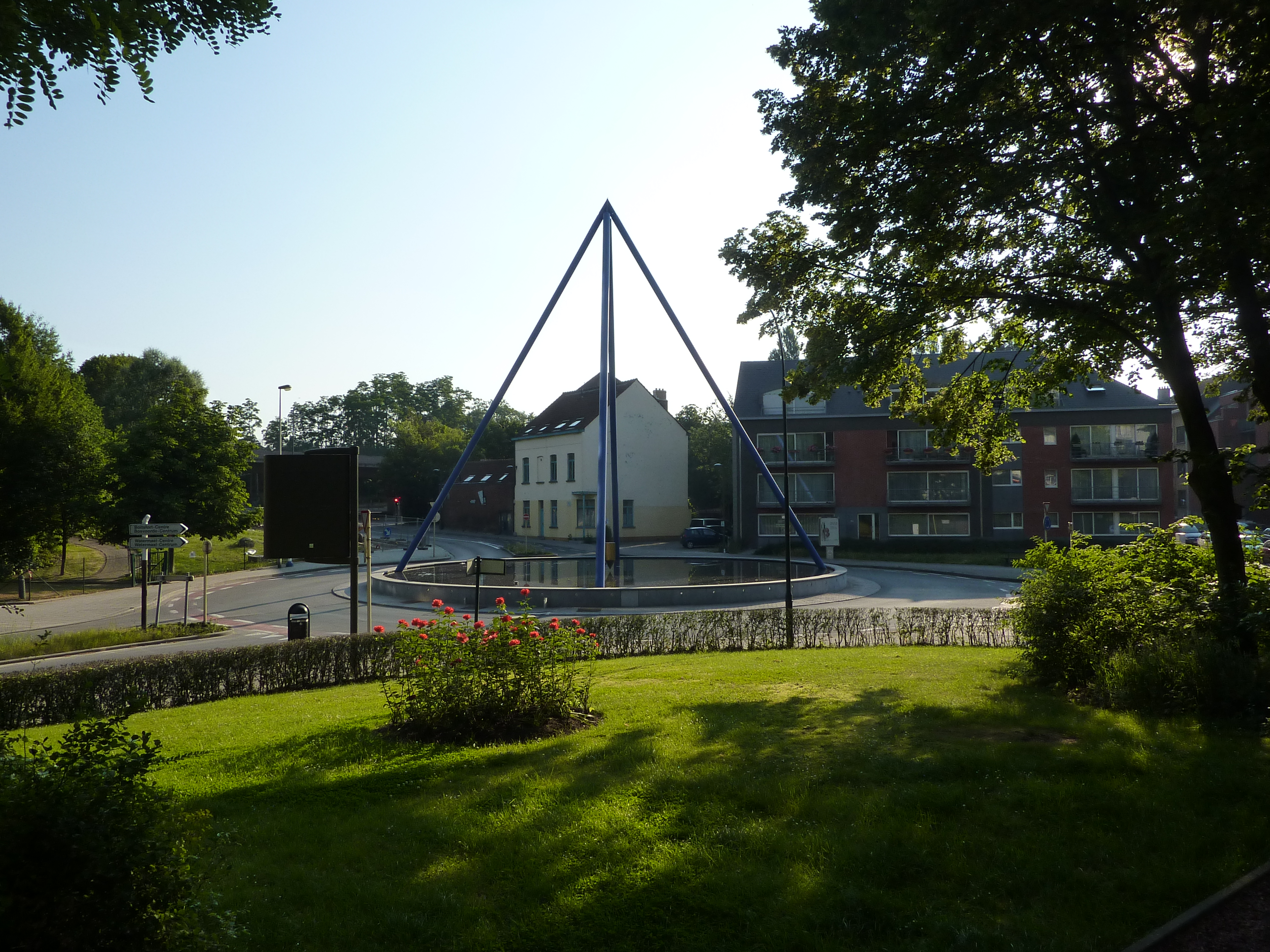 Rond-point rue des Pêcheries et avenue de la Houlette à Auderghem, Bruxelles, Belgique.